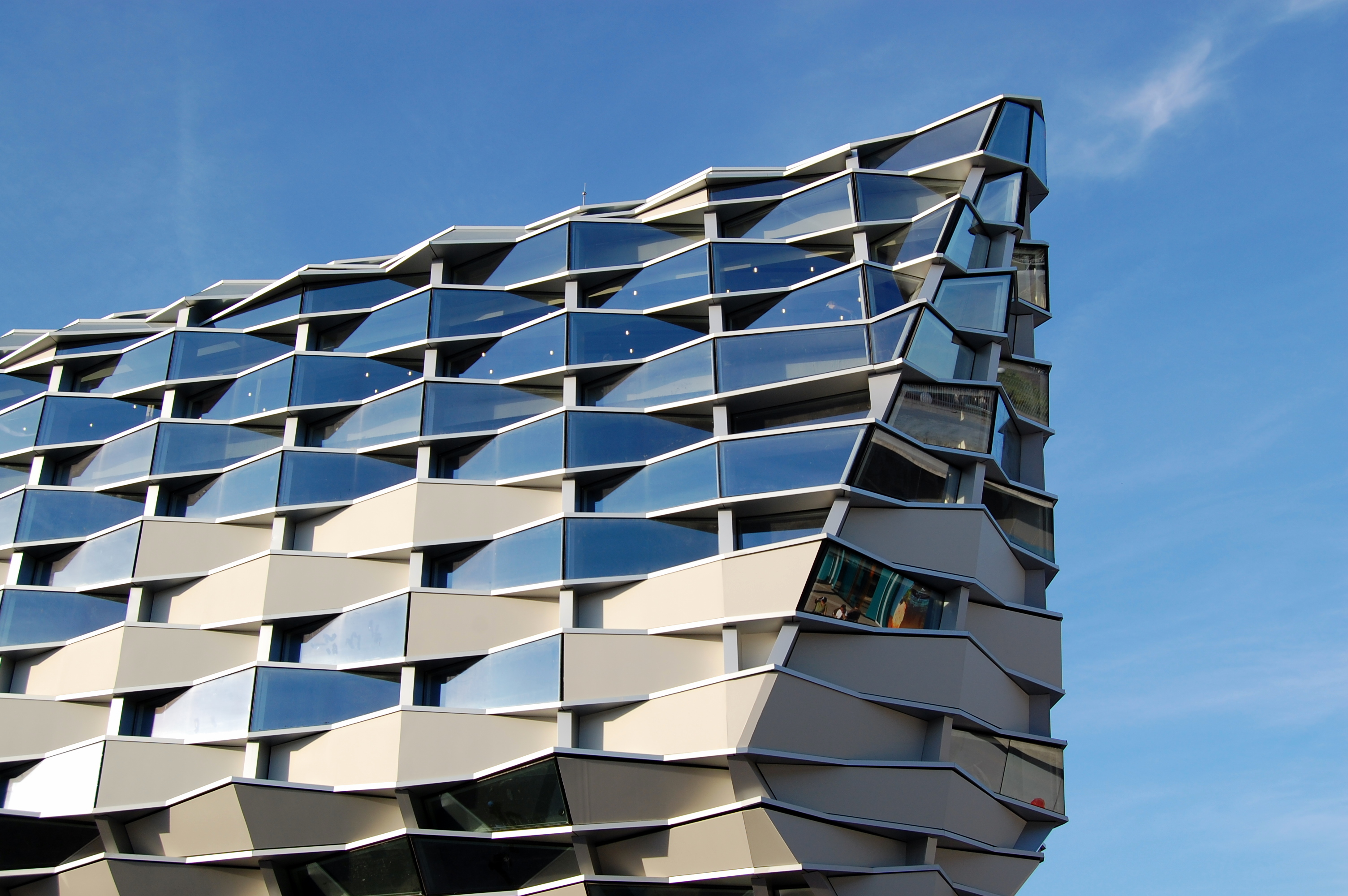 El pabellón de Aragón, lleno de espejos, en la Expo de Zaragoza 2008, España.